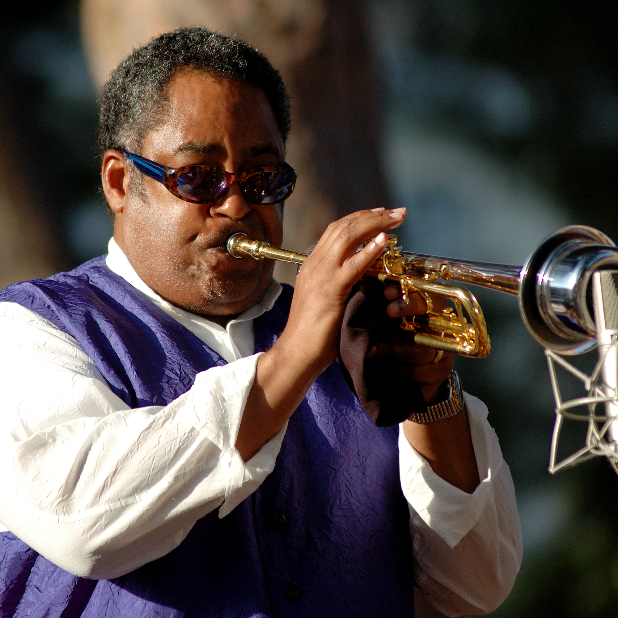 Portrait du trompettiste de jazz américain Jon Faddis, réalisé en extérieur le 17 juillet 2007dans le cadre du Festival "Off" de Jazz à Juan. Il était l'invité du Stanford University Jazz Orchestra dirigé par Fred Berry.